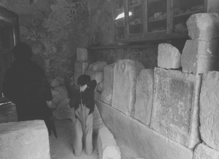 Ruinas, Restos arqueológicos - Clunia (Burgos) - Fotografía B/N